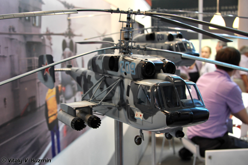 Ka-29